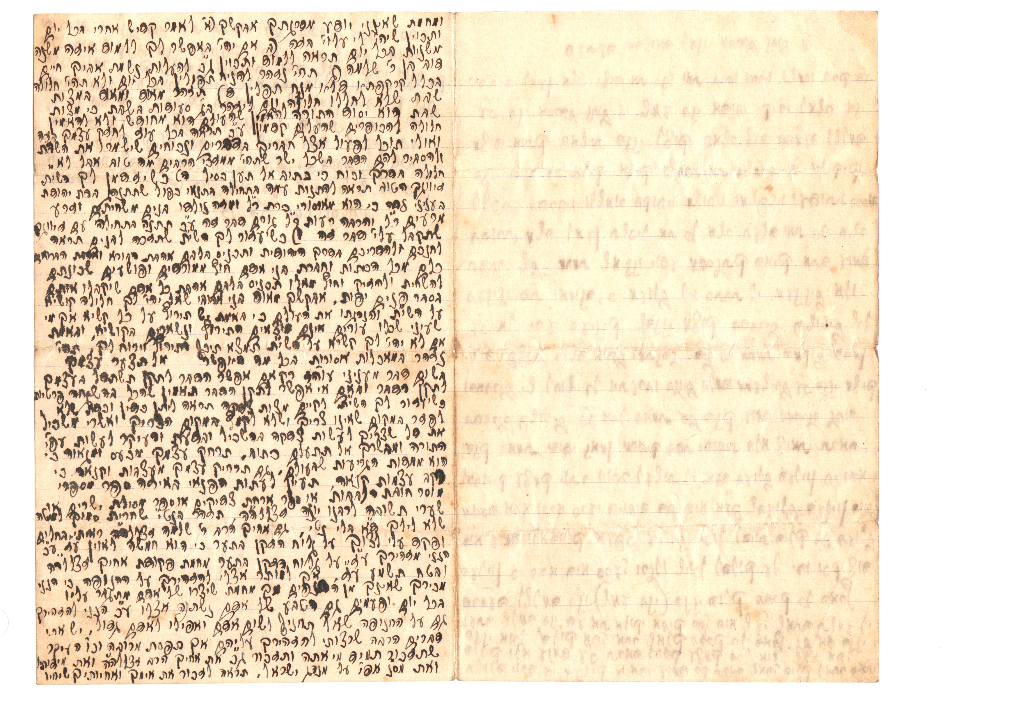 חלק שני של הצוואה שכתב הרב חיים דוב שטענצל לבנו הסופר אברהם נחום שטנצל